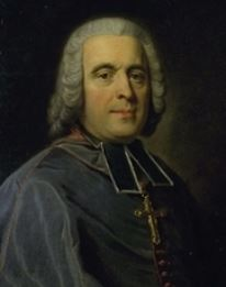 Huile représentant Joachim François Mamert de Conzié en buste.